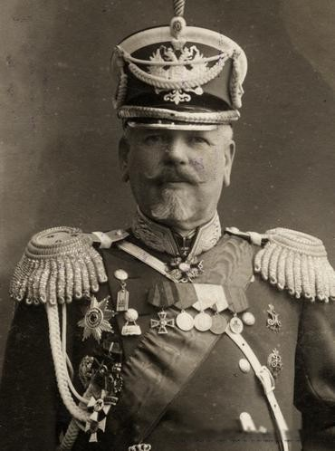 Михаил Никифорович Кайгородов (25 октября 1853 — октябрь 1918) — генерал от инфантерии, иркутский губернатор, комендант Гродненской крепости.